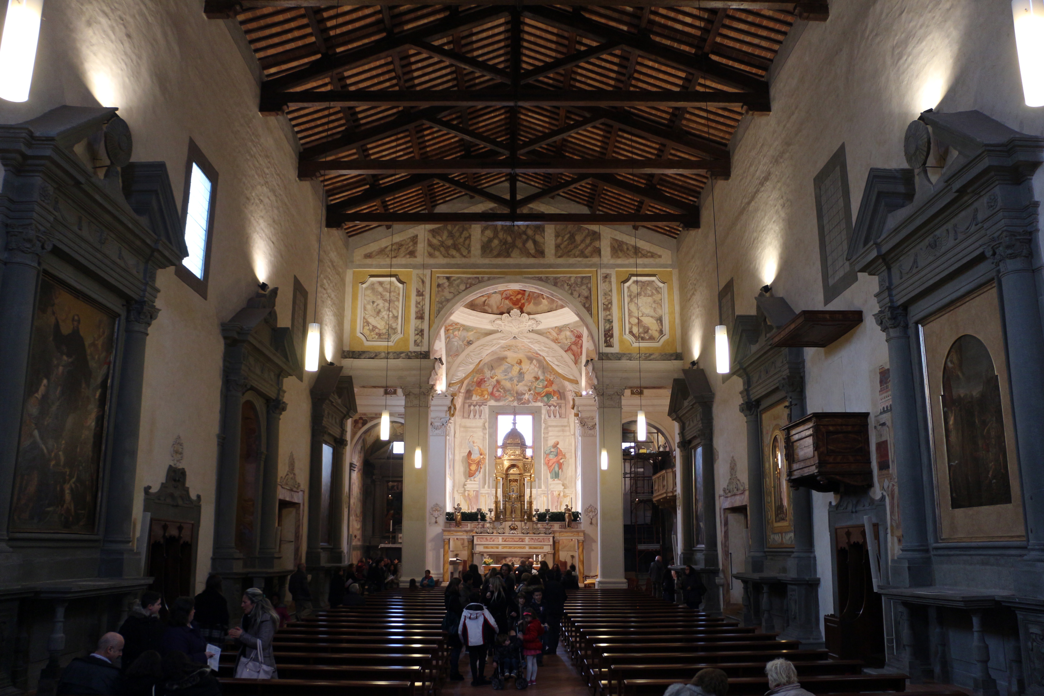 San Francesco (Castelfiorentino) This is a photo of a monument which is part of cultural heritage of Italy.